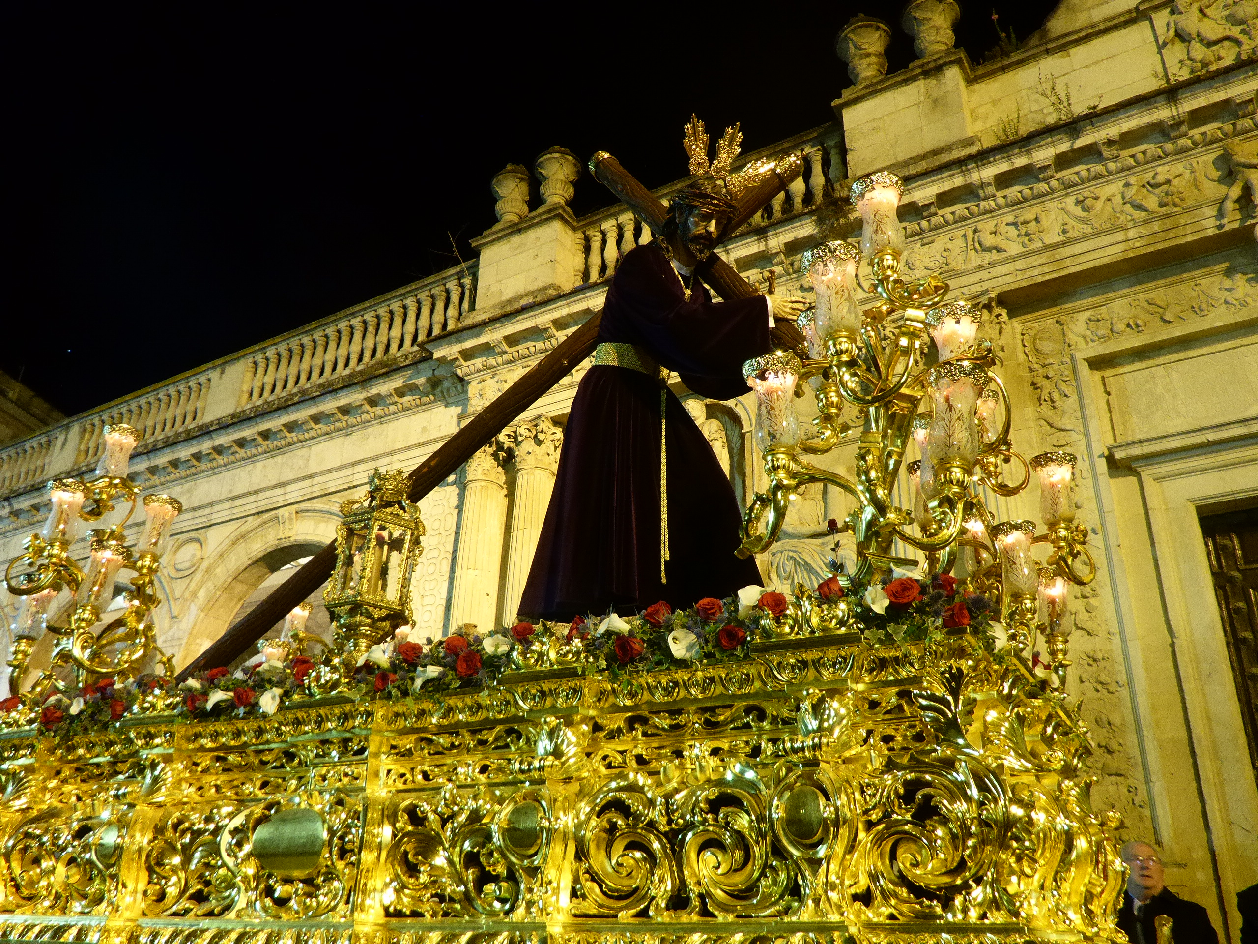 Hermandad del Consuelo (Jerez, España) This is a photography of a Folklore festival in Spain (Wikidata id Q6124533).